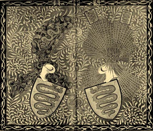 A franczia király czímer-adománya Garai Miklós részére. A Párisban, 1416 márczius 26-án kelt oklevél eredetijét Zsigmond király ugyanaz nap erősitette meg; mindkettő a báró Mednyánszky család levéltárában őriztetik. A czimerképet Zsigmond megerősitő oklevelének miniatureje után másolta Passuth Ödön. A kép vörös alapon narancs szinü levéldiszszel behintett szőnyegen két egymás felé forditott pajzsban a Garai család ősi czimerét: kék mezőben az arany országalmát harapó hétszer kunkorodó koronás arany kigyót tünteti fel. A jobboldali pajzs sisakjának oromdisze aranykoronából kiemelkedő kék strucztollforgón a czimeralak koronás kigyója; a sisak-foszlányokat szintén kék strucztollak képezik; a baloldali sisak koronájából arany sugarak emelkednek ki és a banderialis főuri méltóság jelvényeként két négyszögű zászlót tartanak, melyek elsejében a kigyó koronával és országalmával, a másodikban ezek nélkül látható. A két pajzs között van a sárkány rend aranyos jelvénye. A czimerszőnyeg keretének felső vonalát a római birodalmi sas, a magyar kettős kereszt és a cseh oroszlán diszitik